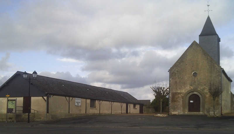 Le jeu de boules près de l'église